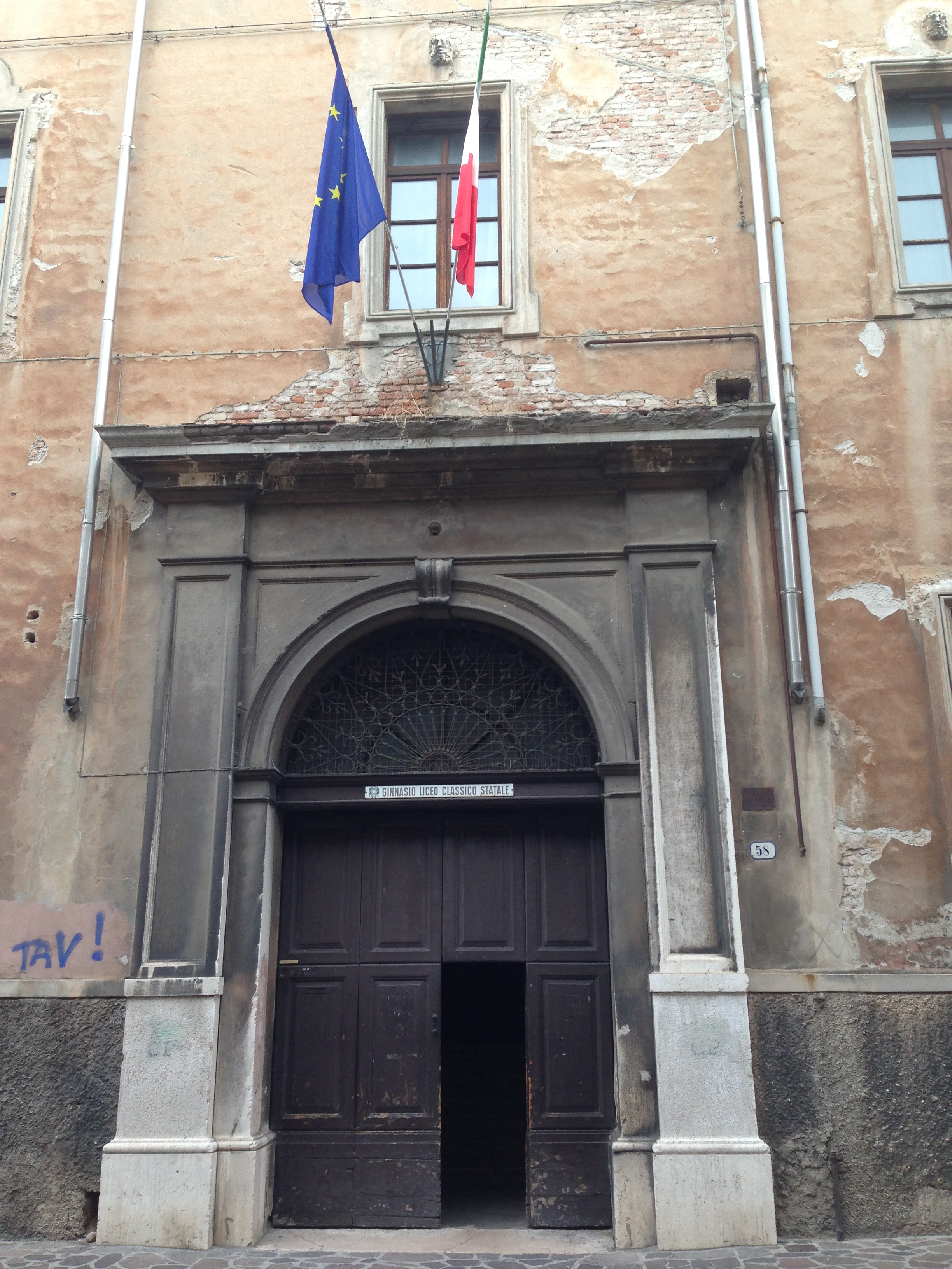 Ex portone d'accesso situato in via Pomponazzo ed ora non più utilizzato come punto d'accesso dell'edificio.